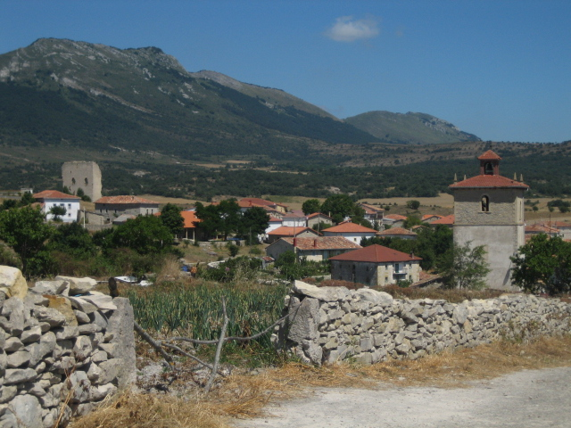 Castrobarto, vista desde el cementerio